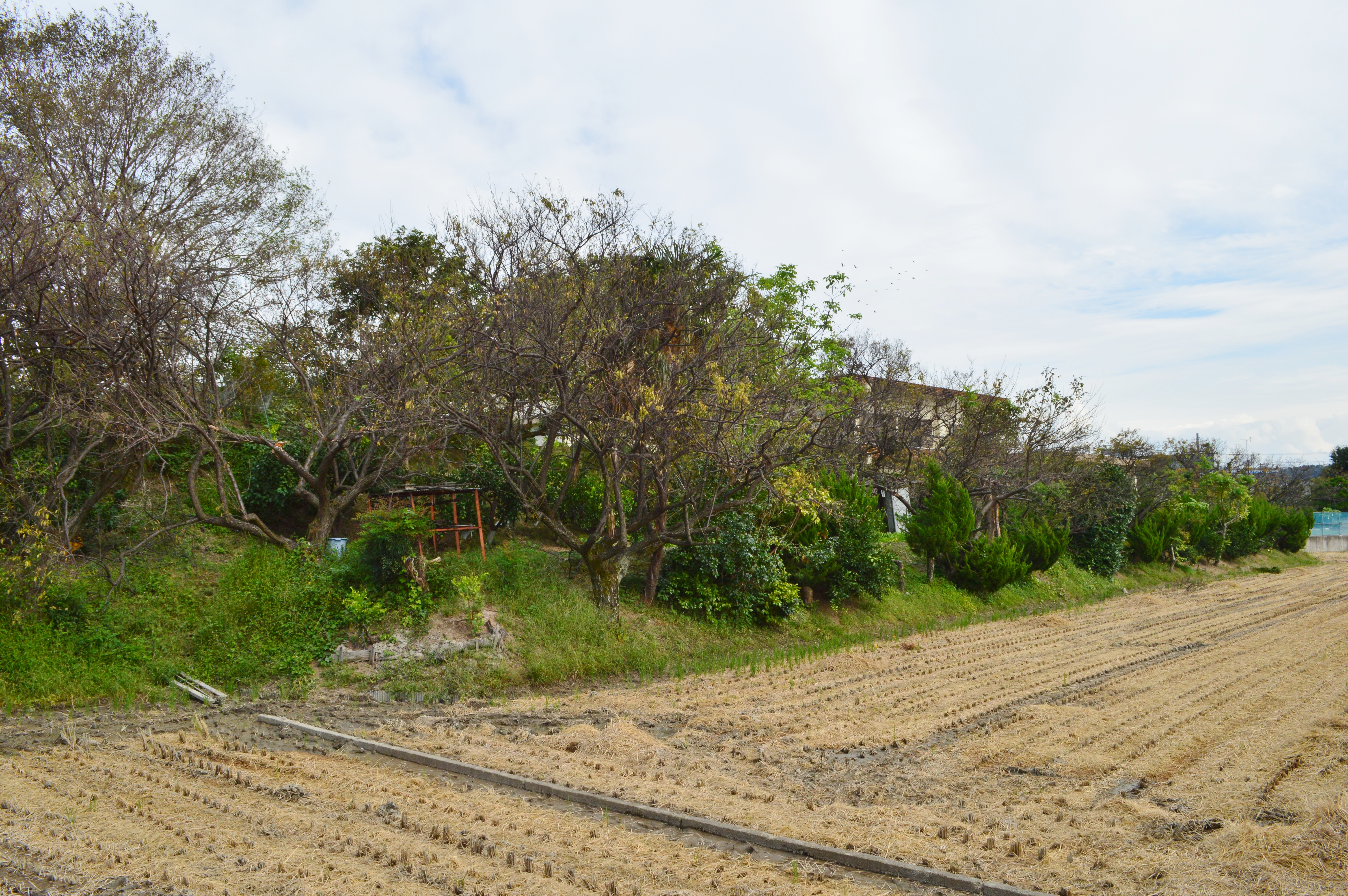 太田城 (紀伊国) 水攻め堤防